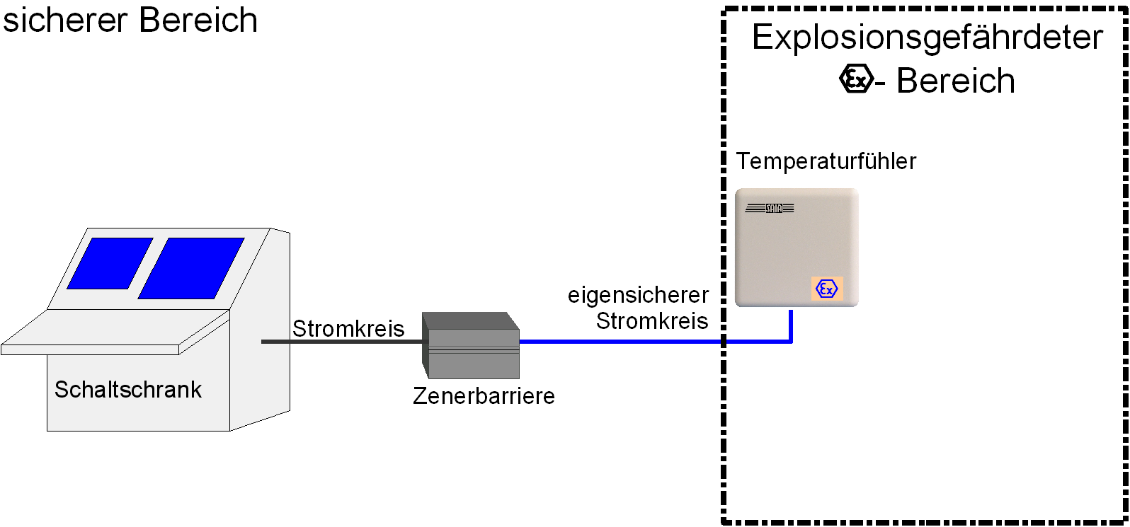 Ex-Schutz mit Zenerbarriere als Sicherheitsbarriere Andere Versionen: ./.